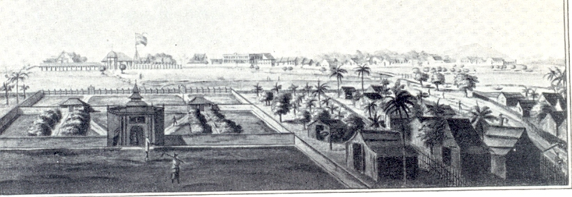 Ansicht Samarang Mitte 18. Jhdt. Tuschzeichnung um 1750